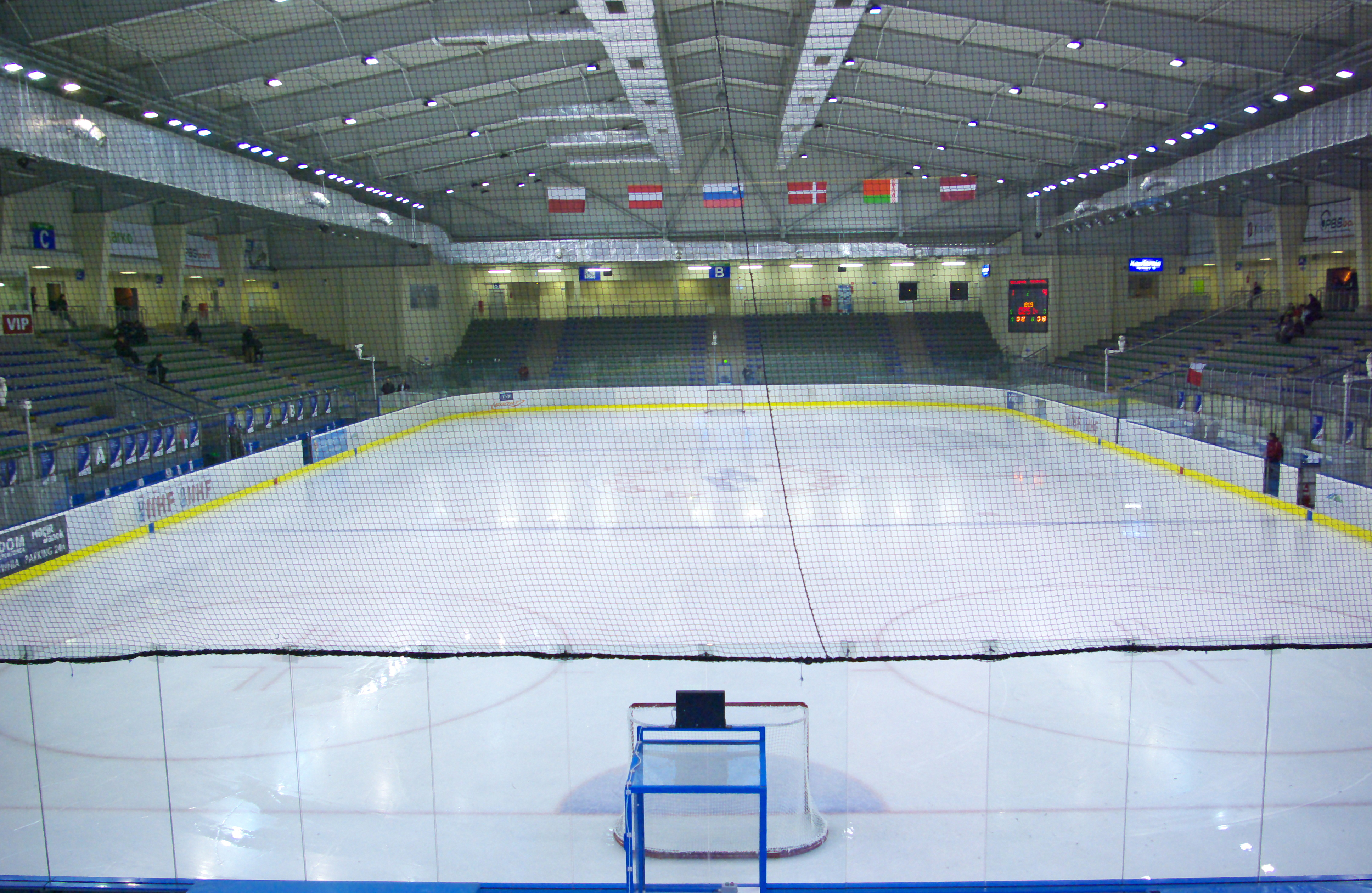 Arena Sanok podczas Mistrzostw Świata Juniorów w Hokeju na Lodzie 2014 I Dywizji w Sanoku, 18 grudnia 2013